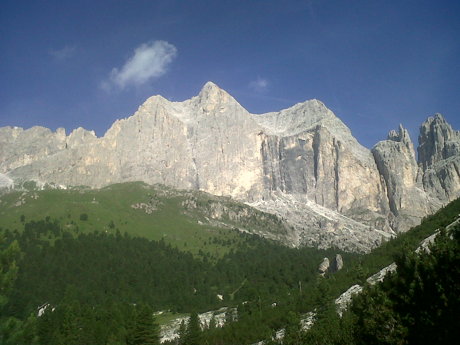 La Cima Catinaccio vista dal primo tratto del Sentiero delle Scalette, poco distante dal rifugio Gardeccia.